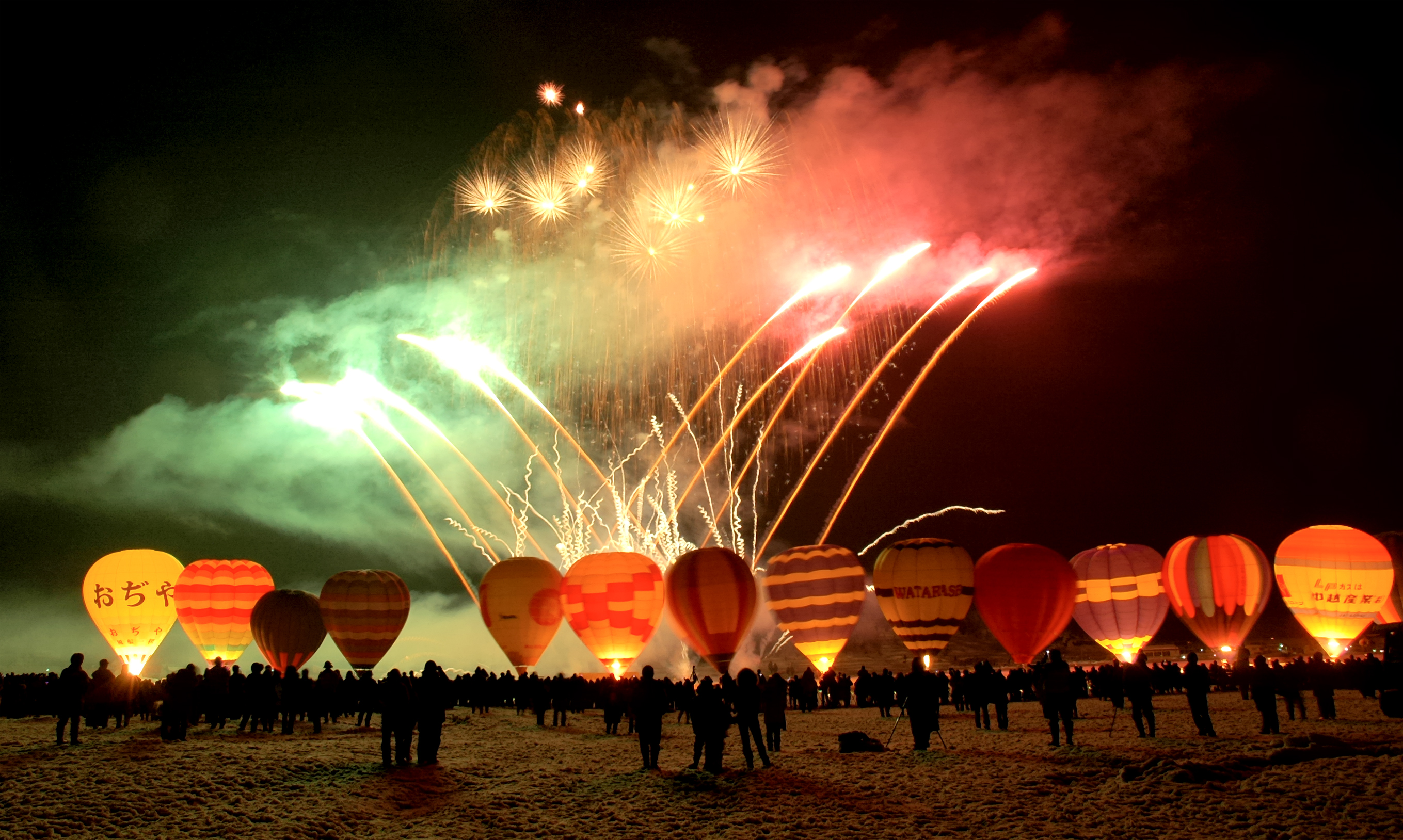 2006 Ojiya Balloon Festival, Night Event (2006年おぢや風船一揆の夜間イベント)